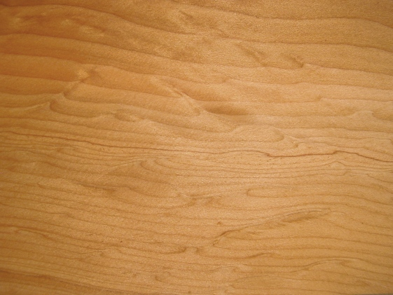 Gemessertes Furnier der Libanon-Zeder, geölt, nicht geschliffen